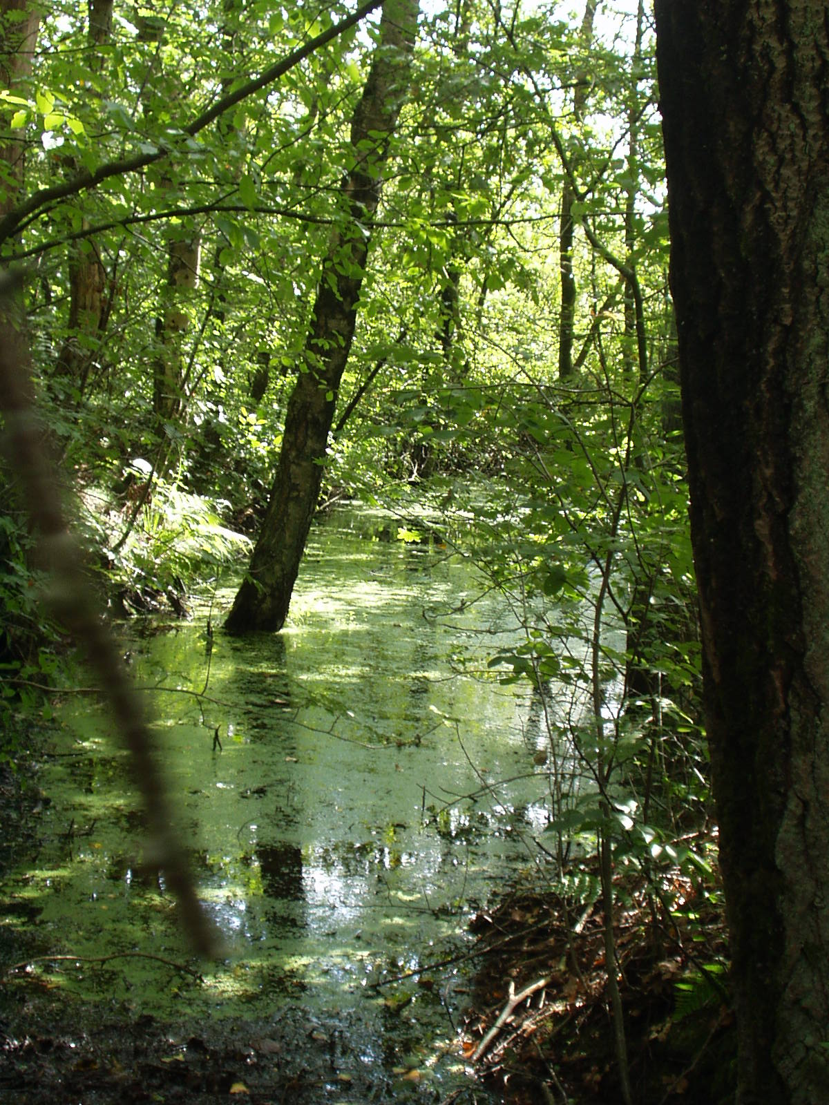 Broekbos moeras